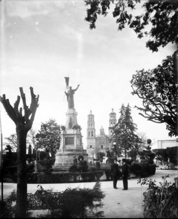 Lugarː Dolores Hidalgo, Guanajuato, México. Fechaː Ca. 1910. Colección Culhuacán - Fototeca Nacional.